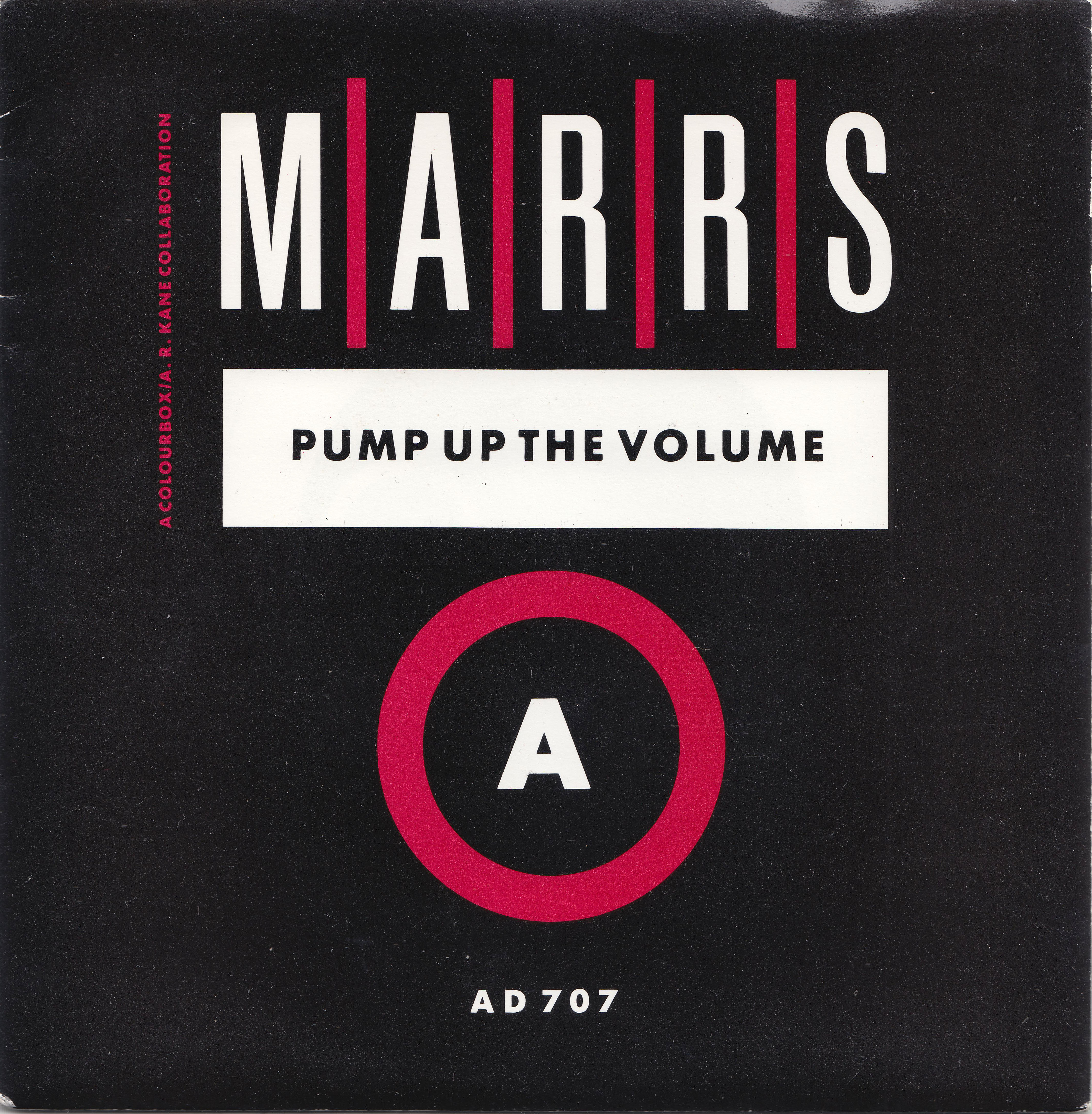 Carátula de "Pump up the volume"